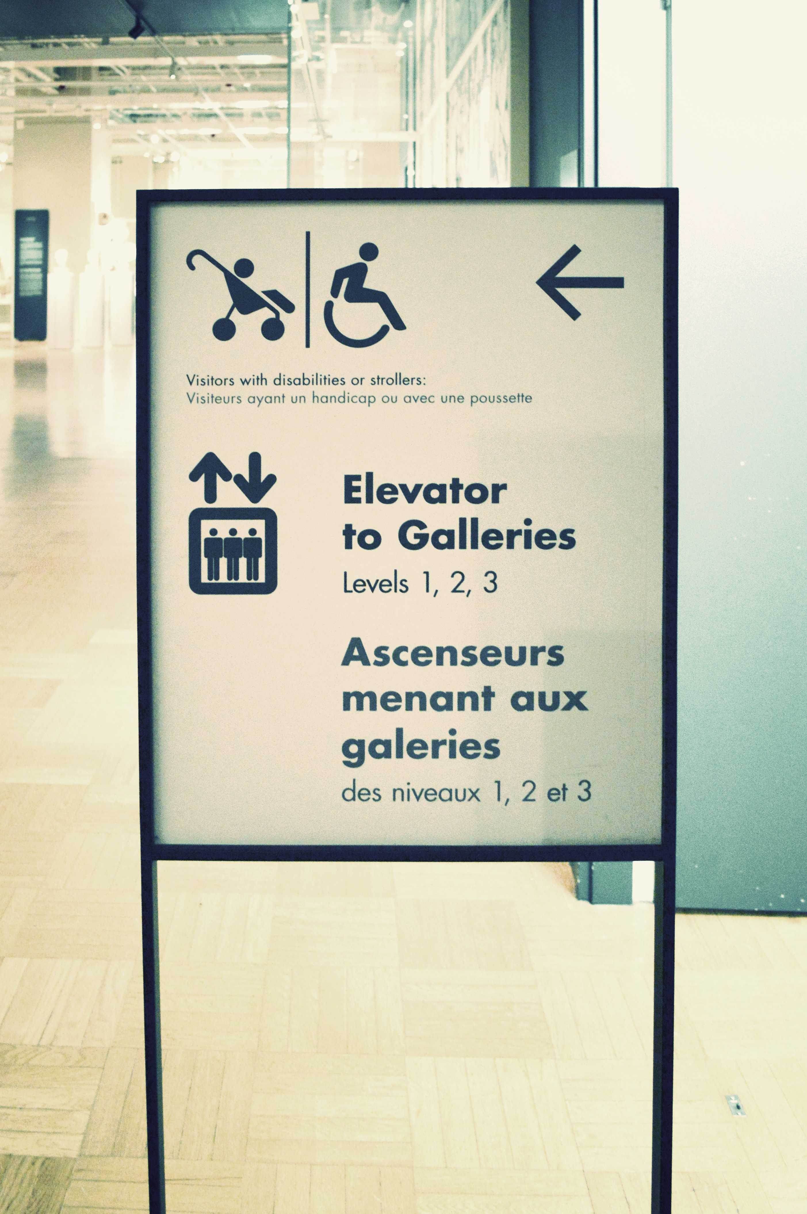 ROM - Royal Ontario Museum, Toronto, Ontario, Canada